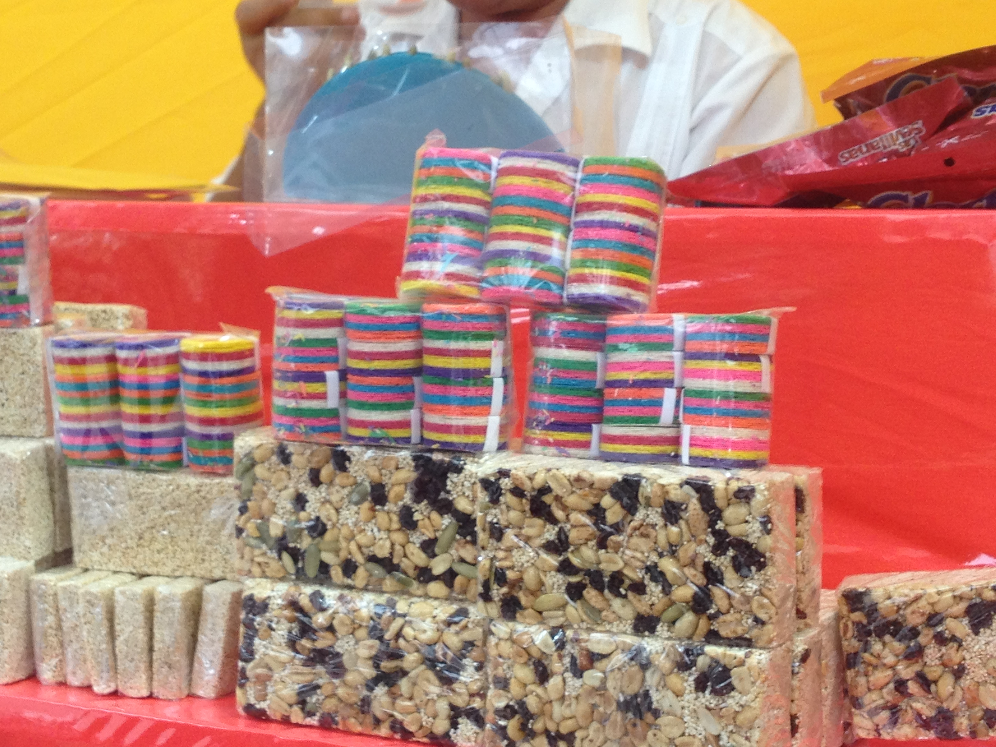 Obleas (arriba) y alegrías (abajos) típicas del estado de Oaxaca, México presentadas en la feria Guelaguetza 2014